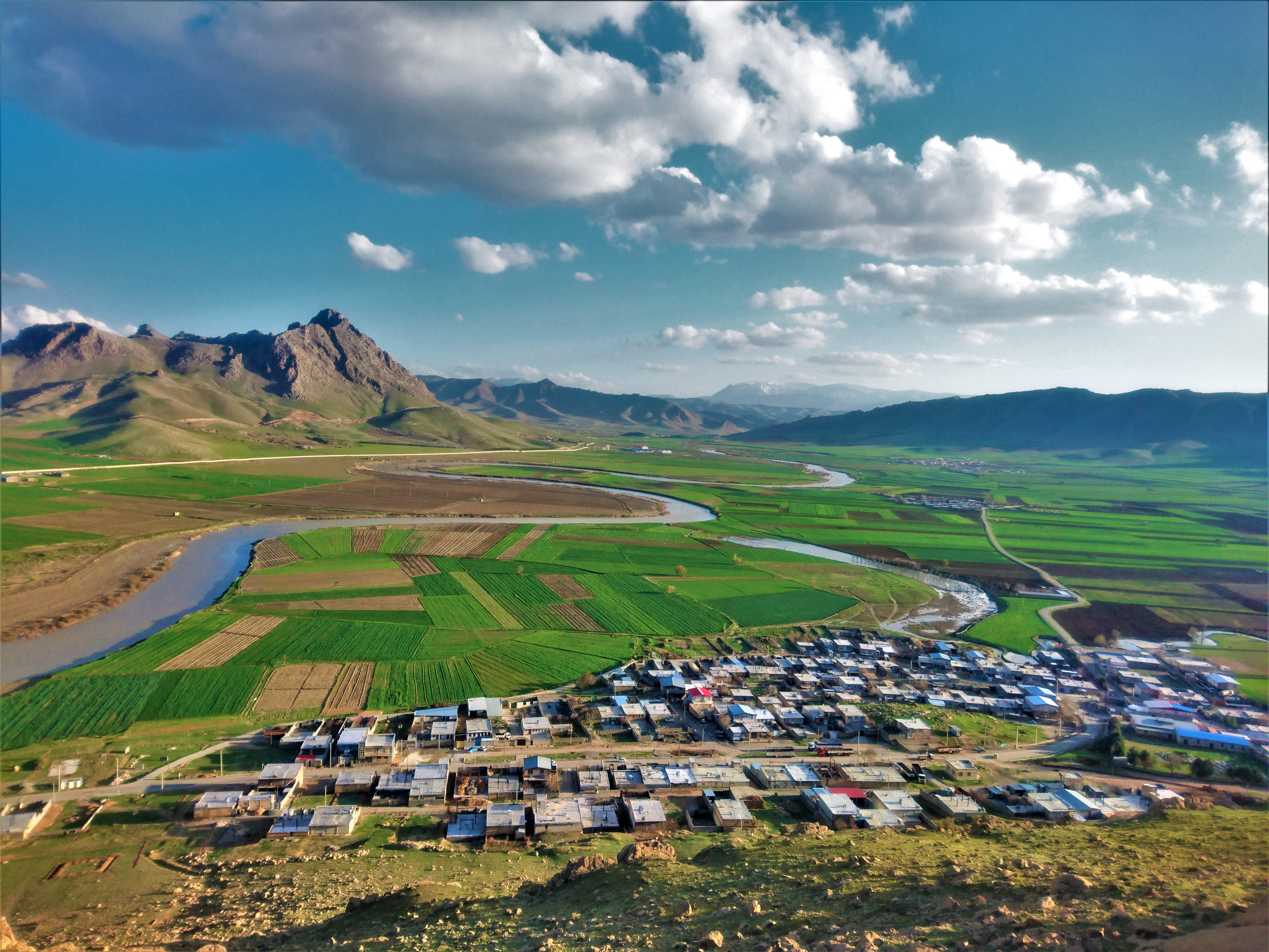 نمایی از روستای سلیمانیه در کنار رودخانه گاماسیاب